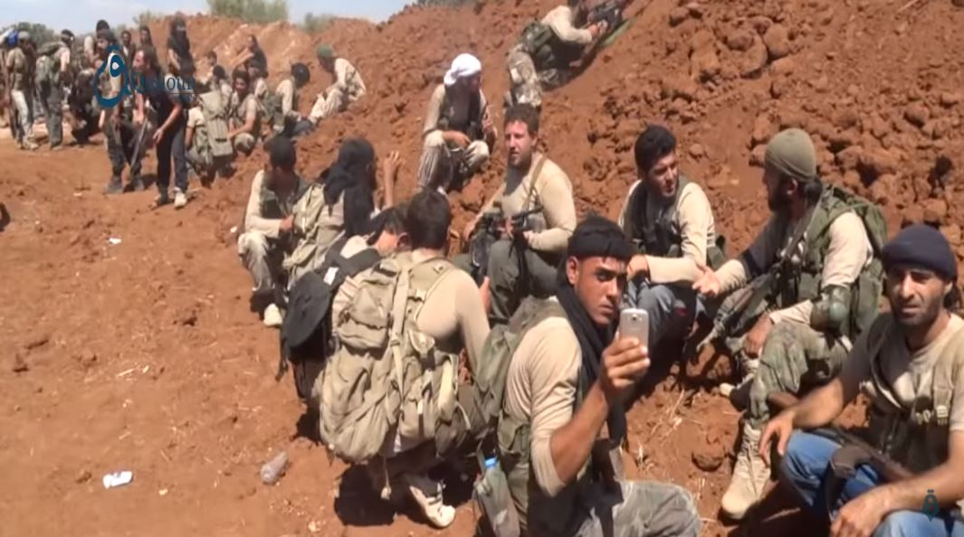 Rebelles des Kataeb Thuwar al-Cham affrontant l'Etat islamique près du village de Tlalin, au nord d'Alep, le 29 août 2015.